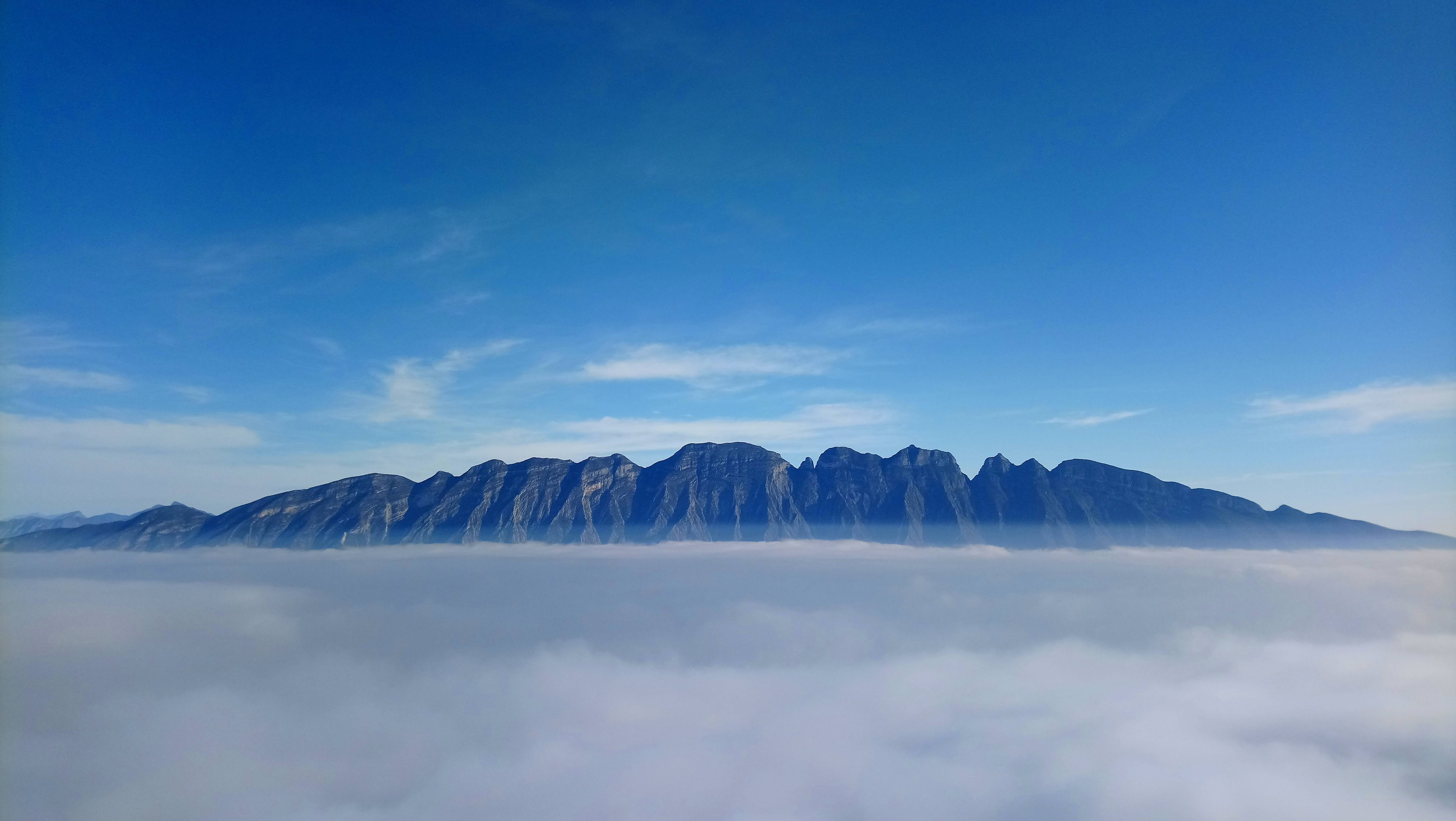 El Cerro de las Mitras sobre las nubes